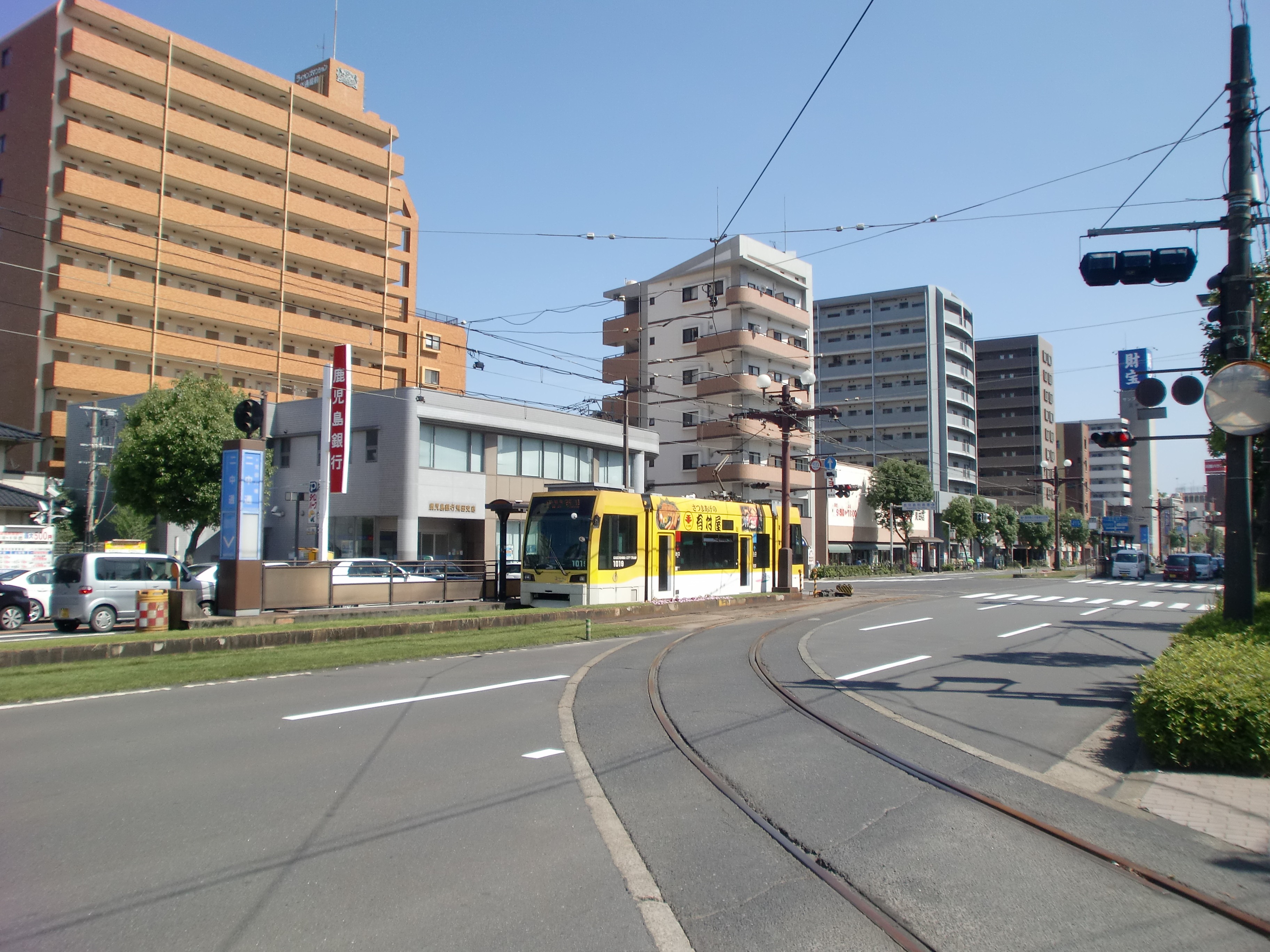 二中通停留場の画像。